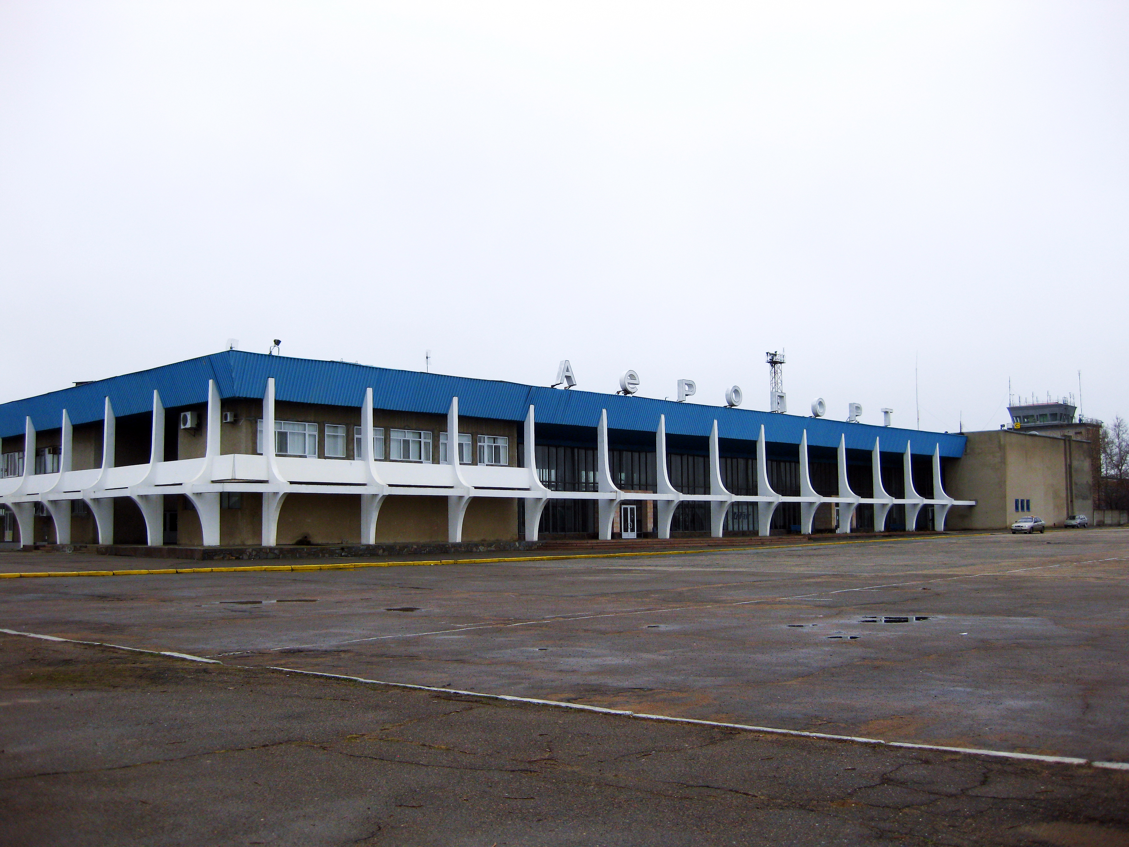 Терминал аэропорта «Николаев»